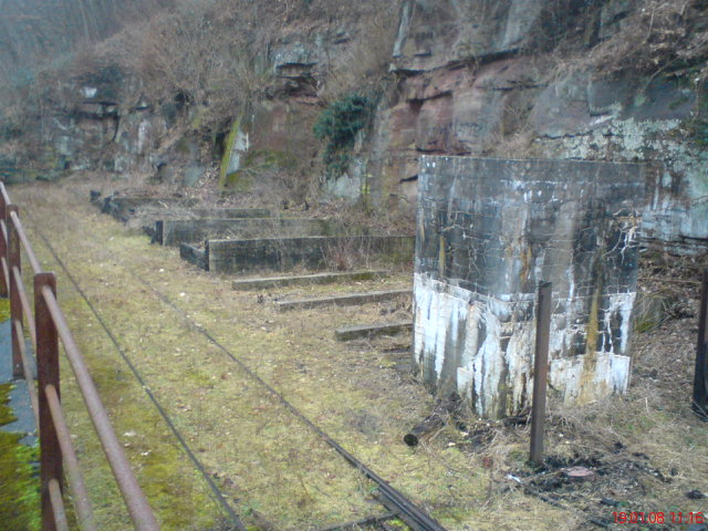 Betonsockel des Kohlenkrans und Kohlenbansen am Bekohlungsgleis im Bw Calw